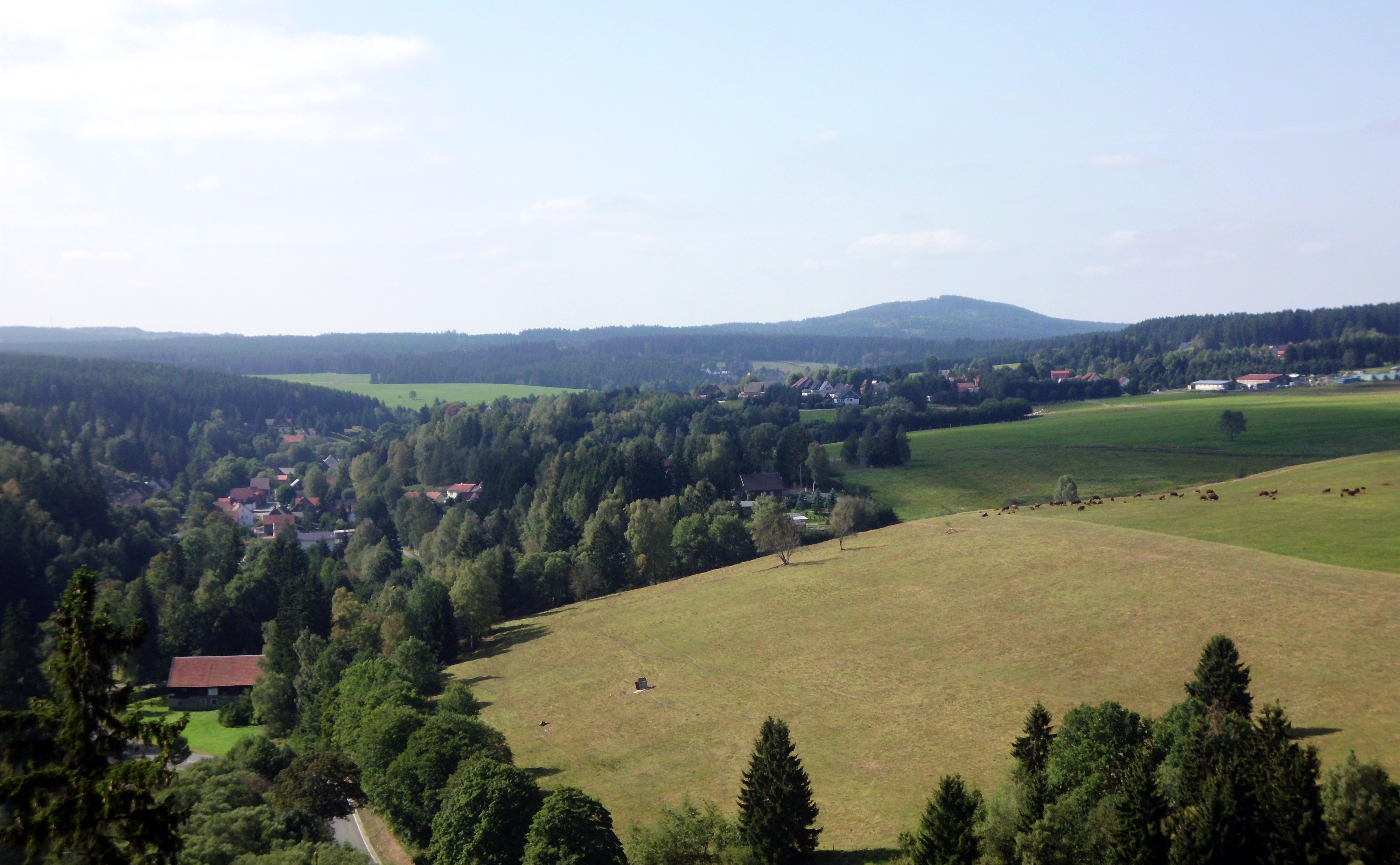 Blick auf Tanne vom Kapitelsberg